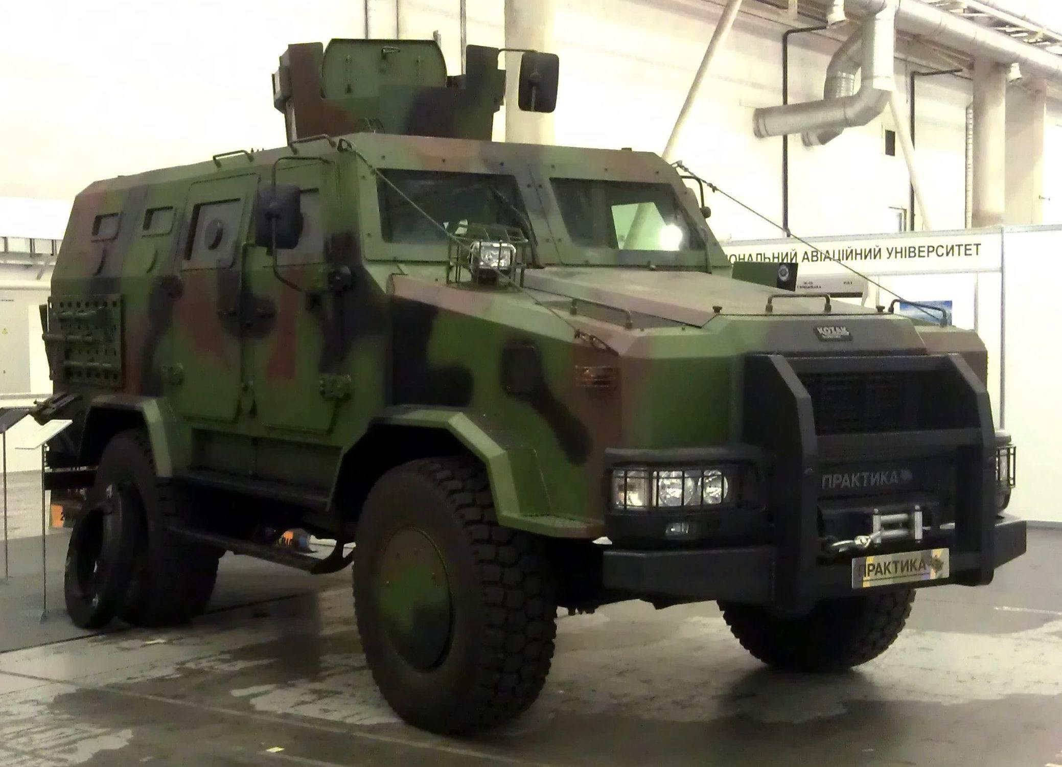 ББМ "Козак-2" на стенде НПО "Практика". Версия с укороченной колесной базой. Выставка "Зброя та безпека", Киев, сентябрь 2015 г.